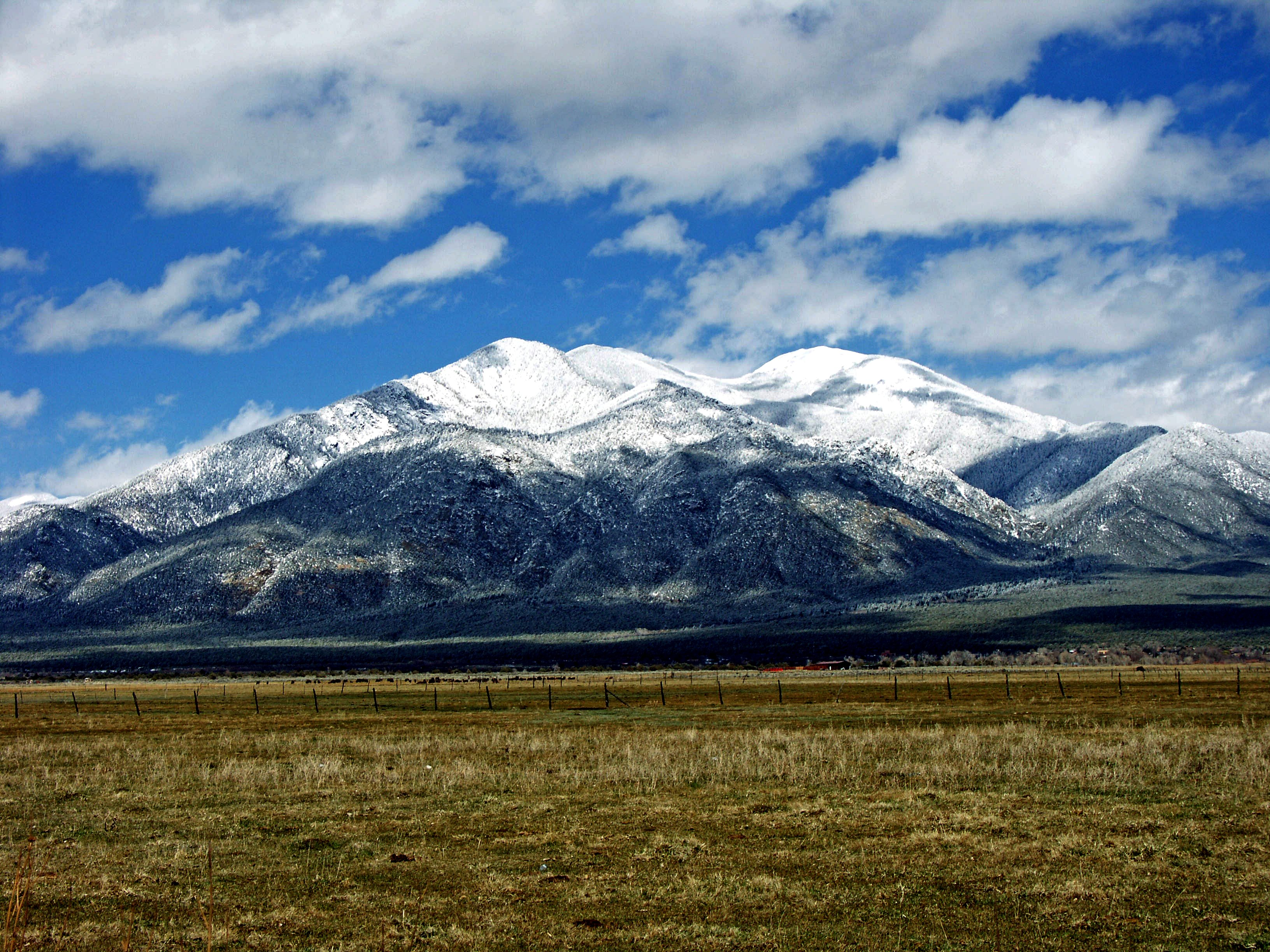 Taos Mtn. from El Prado,New Mexico